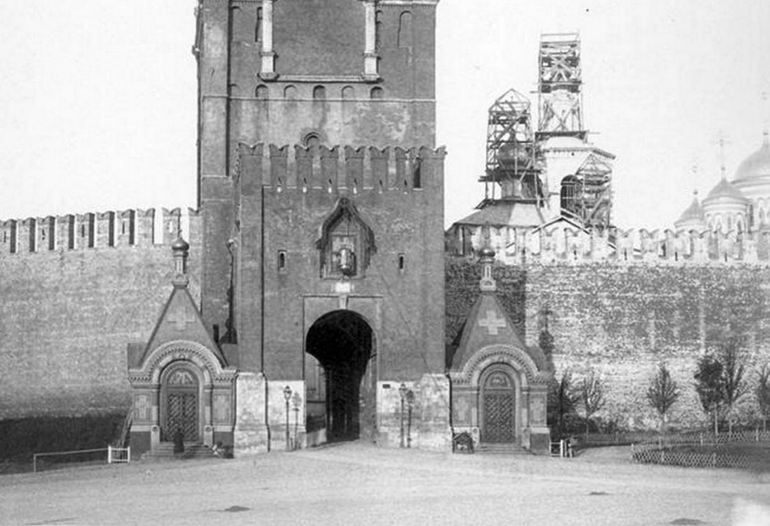 Часовние Великого Совета Ангела и Великого Совета Откровения